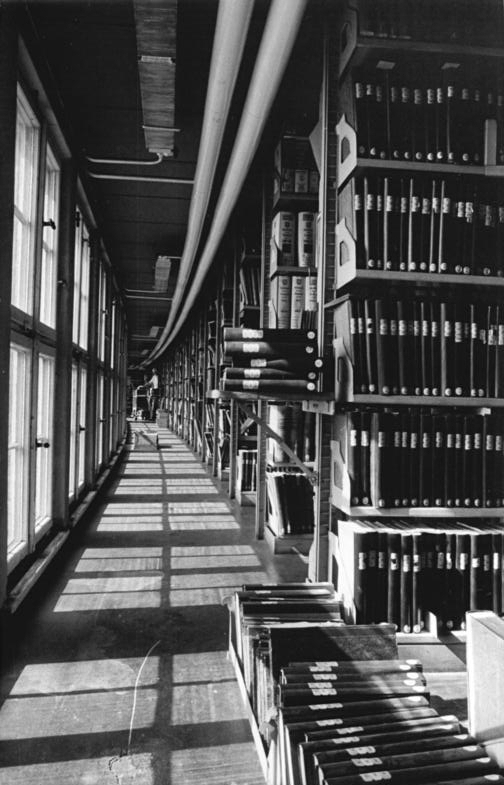 Leipzig, Deutsche Bücherei, Magazin ADN-ZB Grubitzsch 25.9.87 Leipzig: 75 Jahre Deutsche Bücherei- So sieht es in den Magazinen der "Büchertürme" aus, die die Deutsche Bücherei zur Erweiterung ihrer Kapazität erhalten hat. Im Oktober 87 begeht die Bücherei, das Gesamtarchiv des deutschsprachigen Schrifttums der Welt, ihr Jubiläum. Sie wurde 1912 gegründet und sammelt sämtliche Publikationen, die zwischen 1913 und 1945 im deutschen Reich und seit dem 8. Mai 1945 auf den Territorien der DDR, der BRD und von Berlin (West) herausgegeben wurden und werden. Die "DB" verfügt über einen Bestand von mehr als 8 Millionen Bibliographischen Einheiten. (siehe 14,15,17 N)